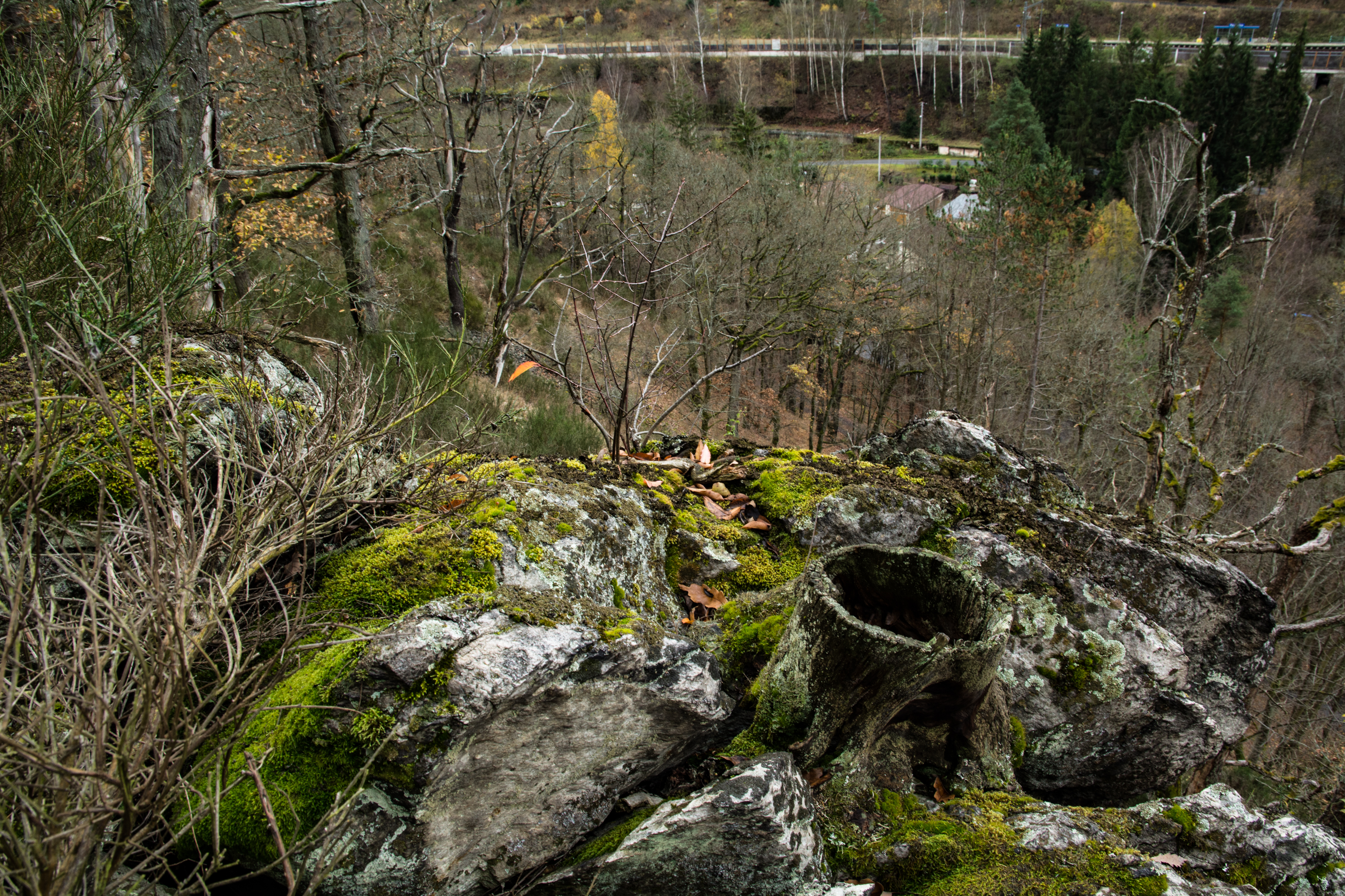 PR Pavlovická stráň